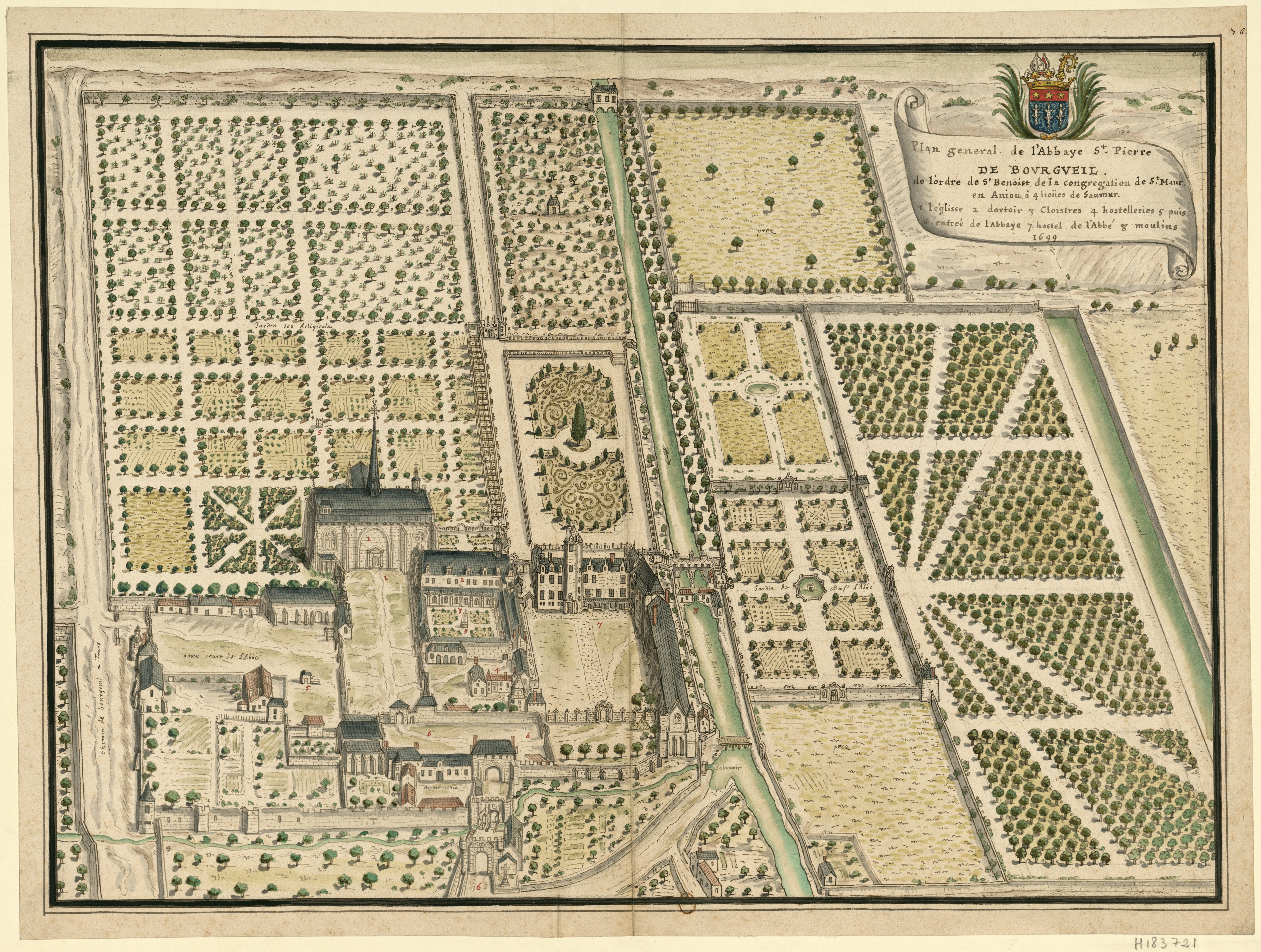 Plan général de l'abbaye St Pierre de Bourgueil, de l'ordre de St Benoist, de la congrégation de St Maur, en Anjou, à 4 lieues de Saumur